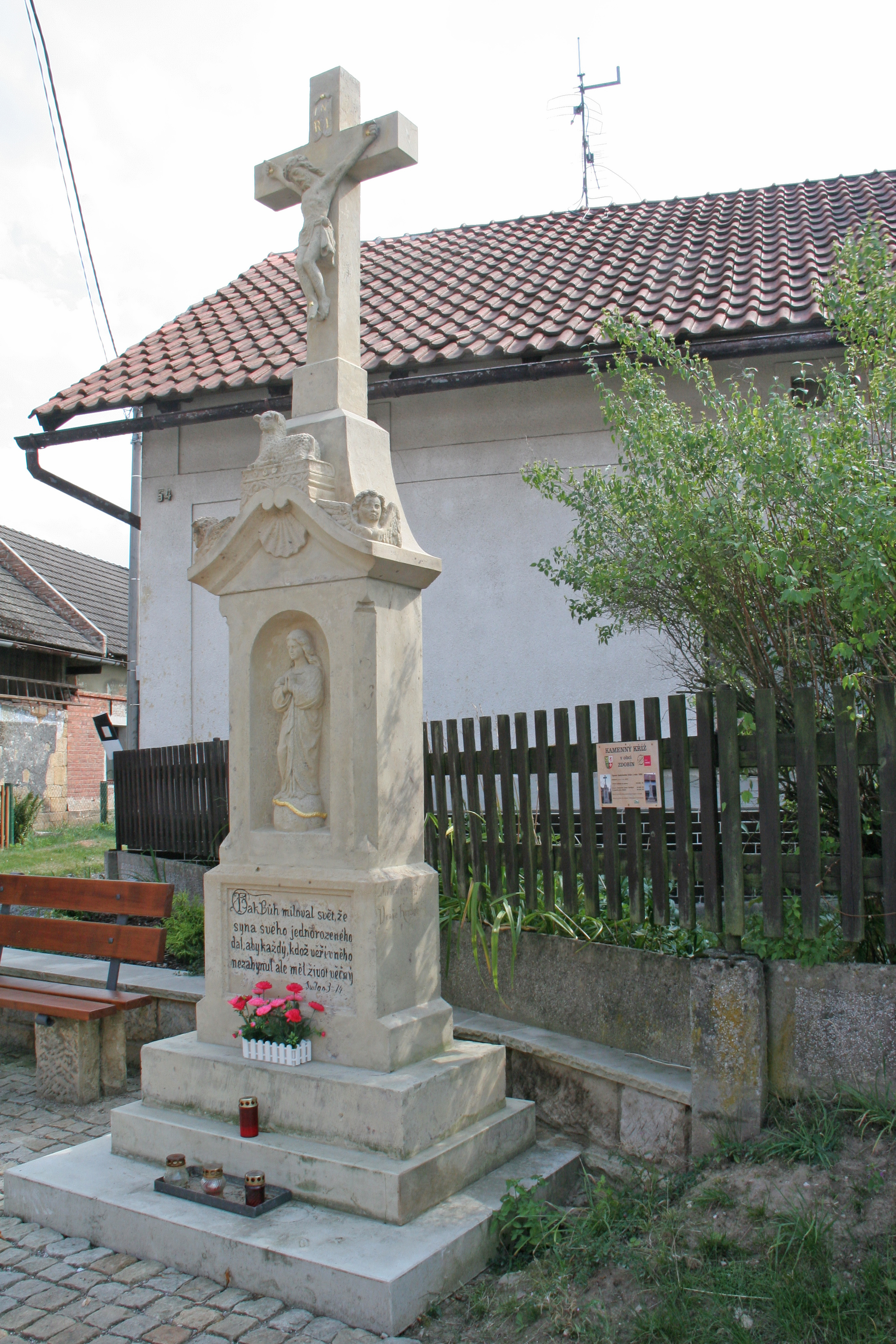 Zdobín křížek z roku 1884. Opraven v roce 2013.